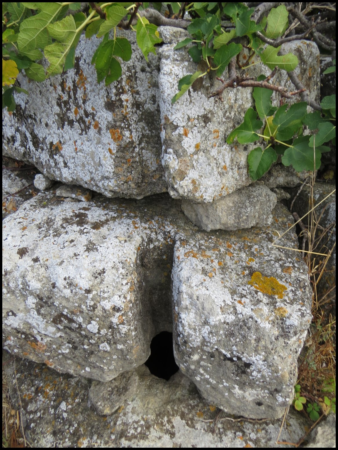 Puits peut être antique, près des carrières de Gouldeau, détail extérieur.Orifice latéral surmonté d'une gouttière. Lespignan, Occitanie